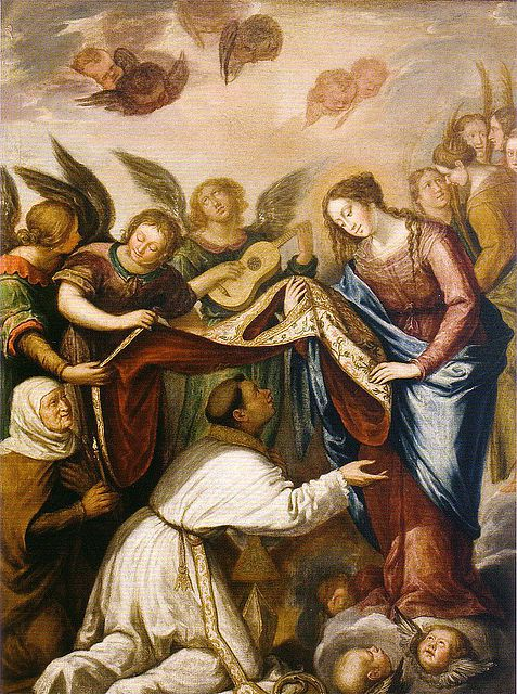 La obra representa la imposición de la casulla a San Ildefonso de Toledo, que fue arzobispo de Toledo.